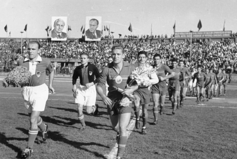 ADN-ZB/Agerpress 10.11.1952 Rumänien schlug DDR-Auswahl 3:1 Am 26. Oktober spielte die Fußballmannschaft der Rumänischen Volksrepublik gegen die DDR-Auswahlmannschaft im Bukarester Stadion der Republik vor einer begeisterten Zuschauer-menge von über 40.000 Menschen. Das Spiel endete mit einem 3:1- Sieg der rumänischen Fußballmanschaft. UBz: Die Mannschaften der Rumänischen Volksrepublik und der deutschen Demokratischen Republik treffen auf dem Spielfeld ein.